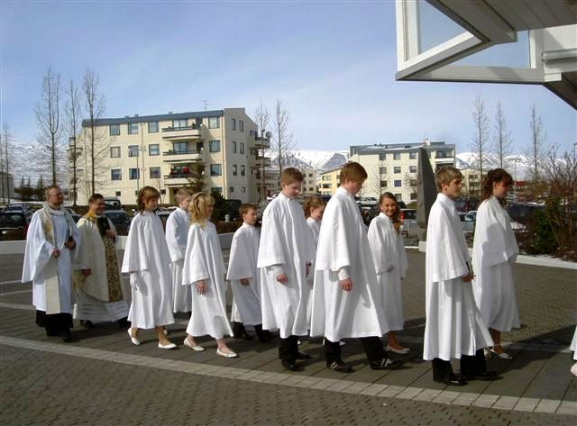 Sr. Arnaldur Bárðarson og sr. Gunnlaugur Garðarsson ganga með fermingarbörnum til athafnar.